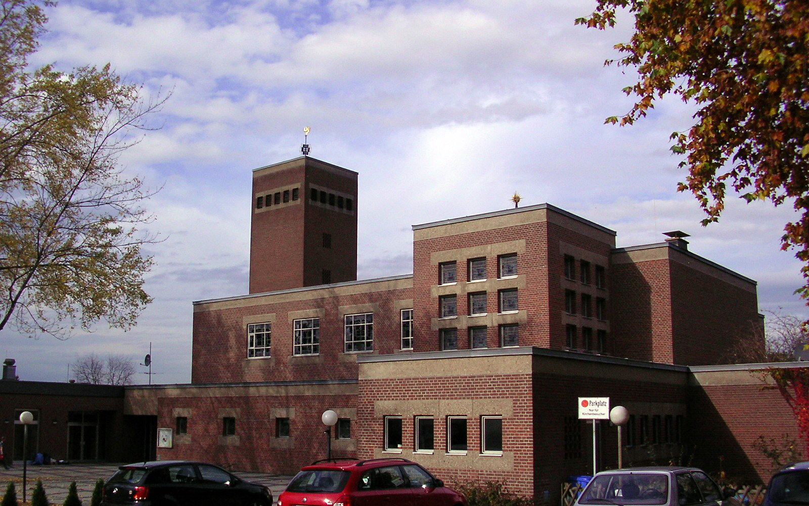 Katholische Kirche Heilige Drei Könige in Bergisch Neukirchen, Südseite mit Eingang und Parkplatz